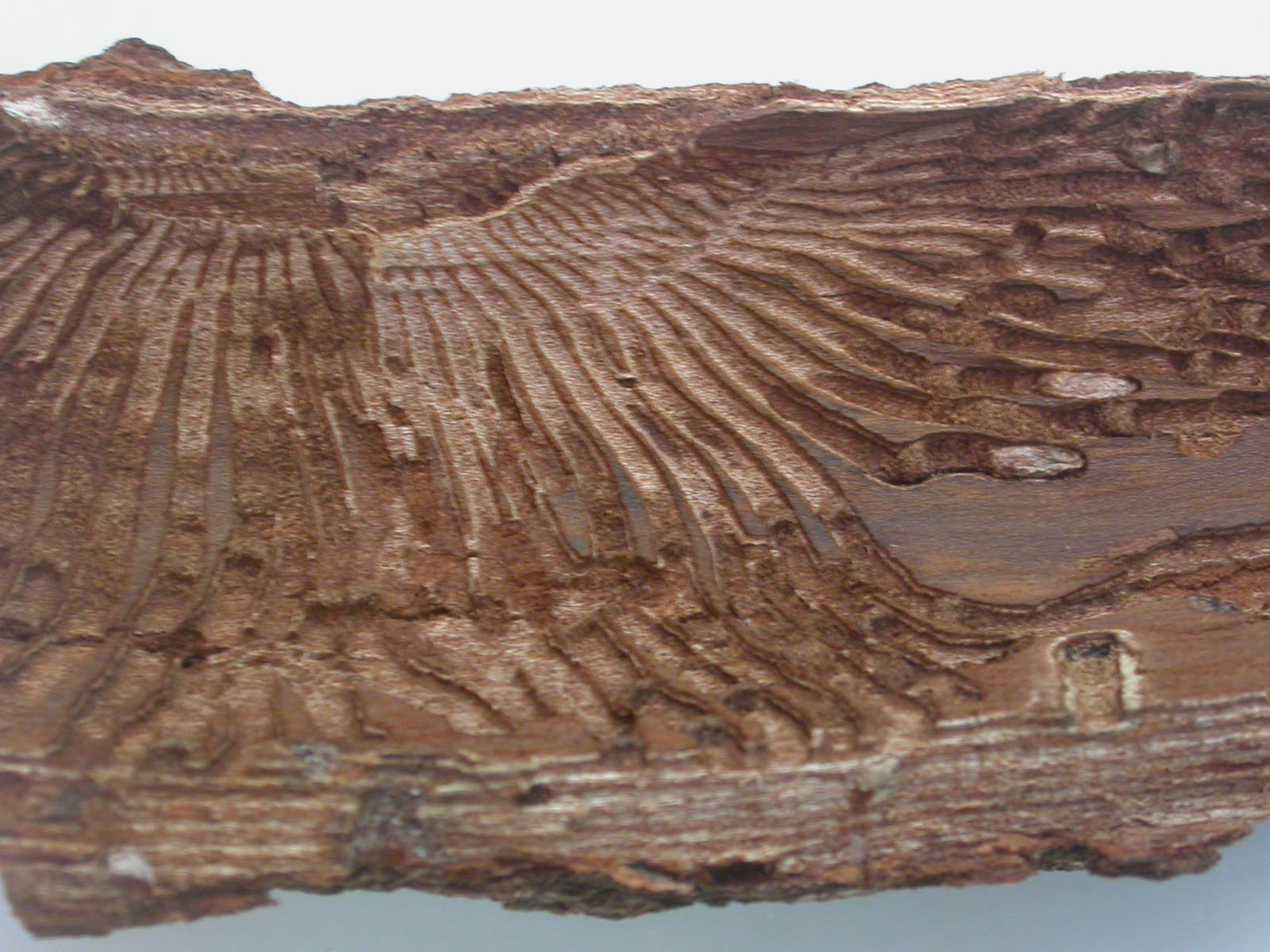 Galleries de scolithes sous l'écorce d'un orme